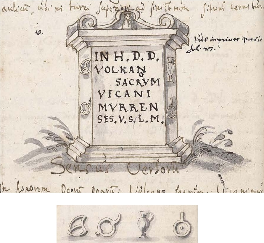 Altar für Vulkan, Benningen am Neckar. Original: Römisches Lapidarium Stuttgart. Abbildung: Zeichnung aus Simon Studion: Vera origo illustrissimae et antiquissimae domus Wirtenbergicae … [Marbach am Neckar] 1597, Seite 25v.